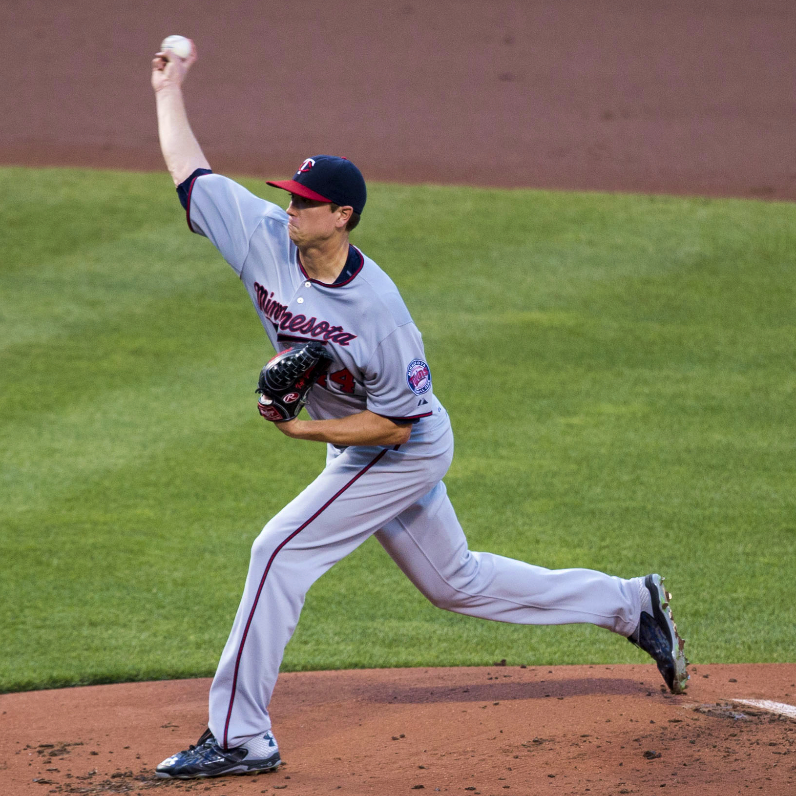 Kyle Gibson